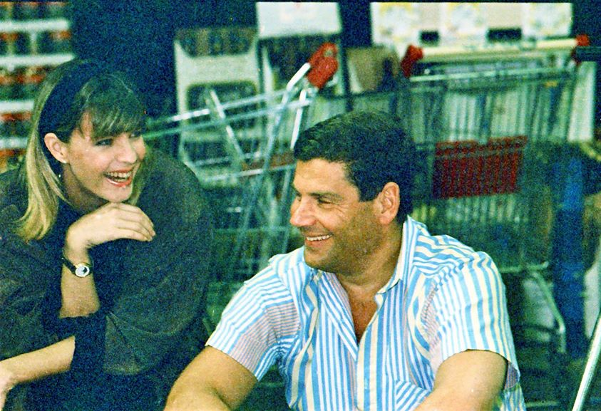 הפקת פרסומת הקרב על המילקי